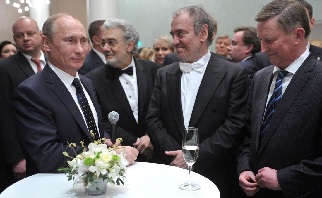 Открытие Новой сцены Мариинского театра